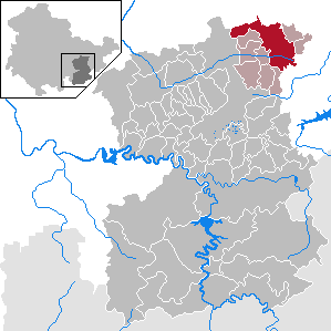 Triptis in Thuringia - Saale-Orla-Kreis